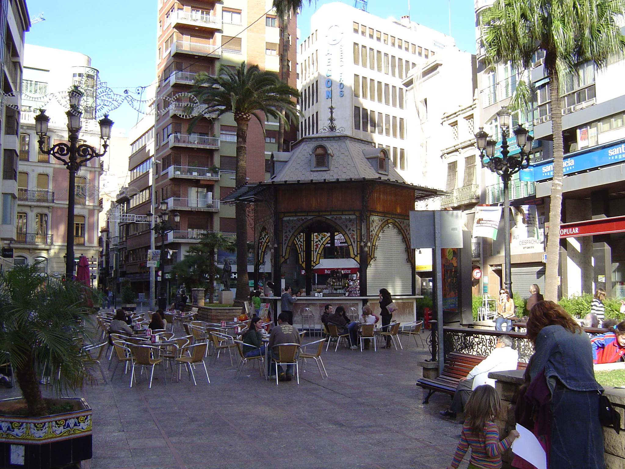 Plaza de la Paz de Castellón de la Plana (España)